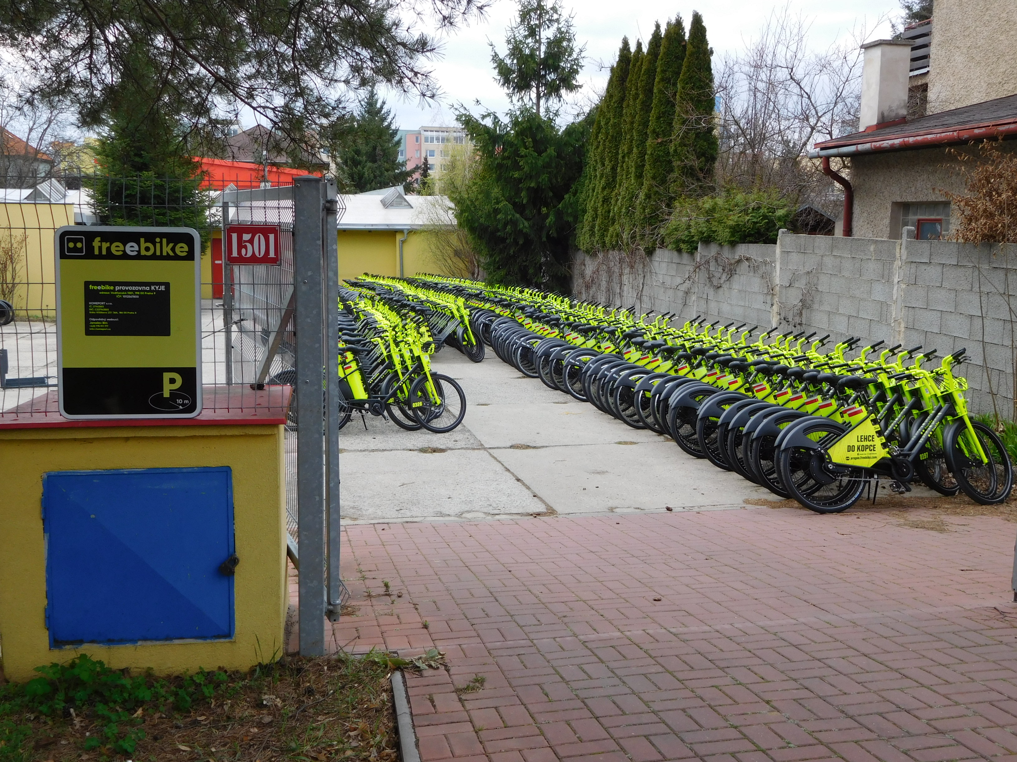 Praha - Kyje, Vodňanská 1501, Homeport - freebike